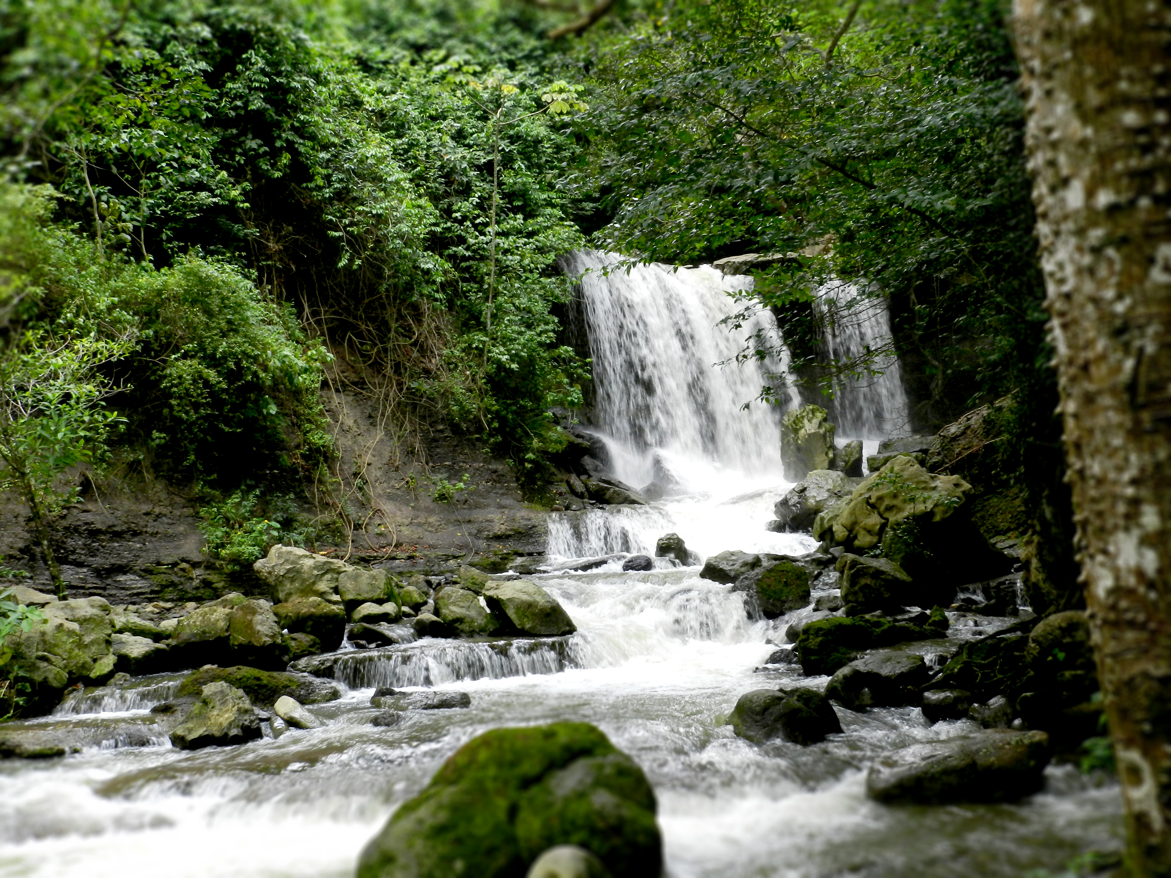 Sierra de San Luis, Estado Falcón